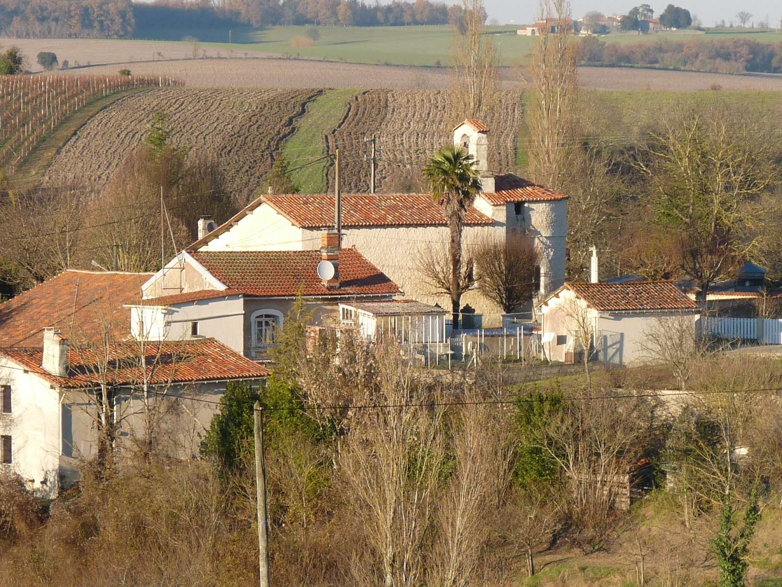 vue de St-Léger, Charente, France